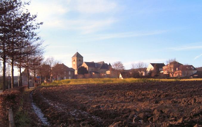 Limburgs: Klumme